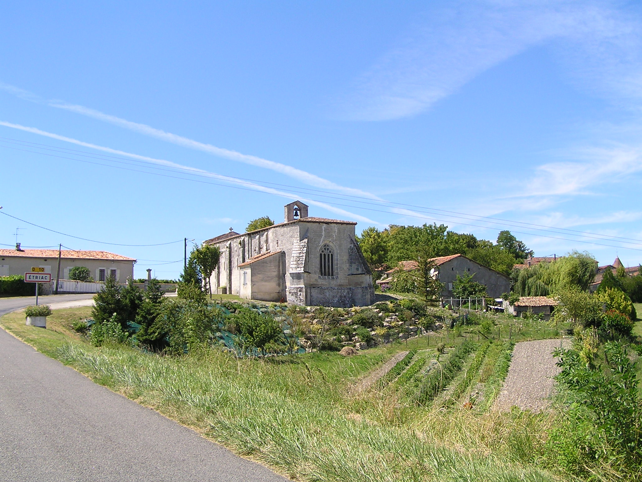 village d'étriac